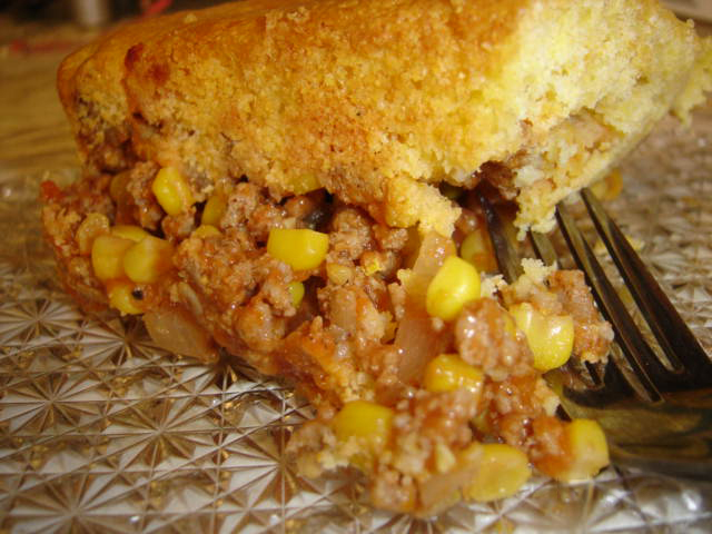 Tamale pie